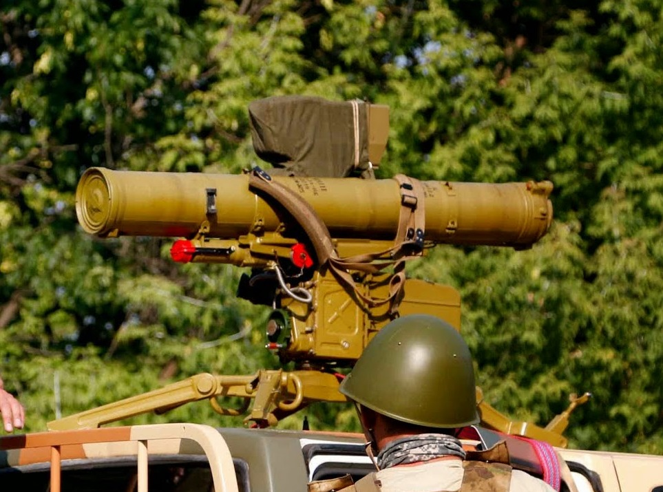 Батальон «Донбасс» под Первомайском